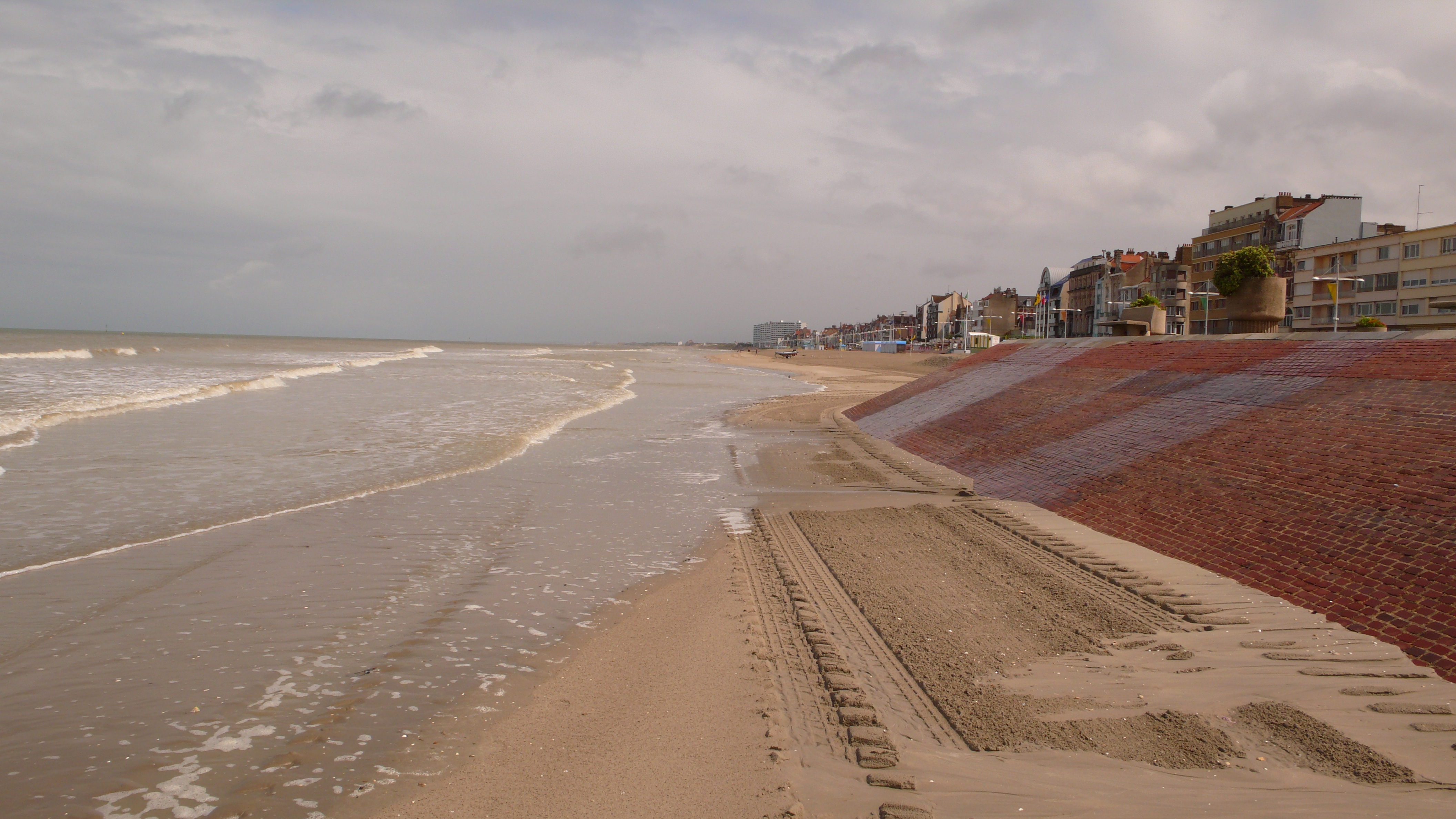 Dunkerque, Malo-les-Bains, Plage